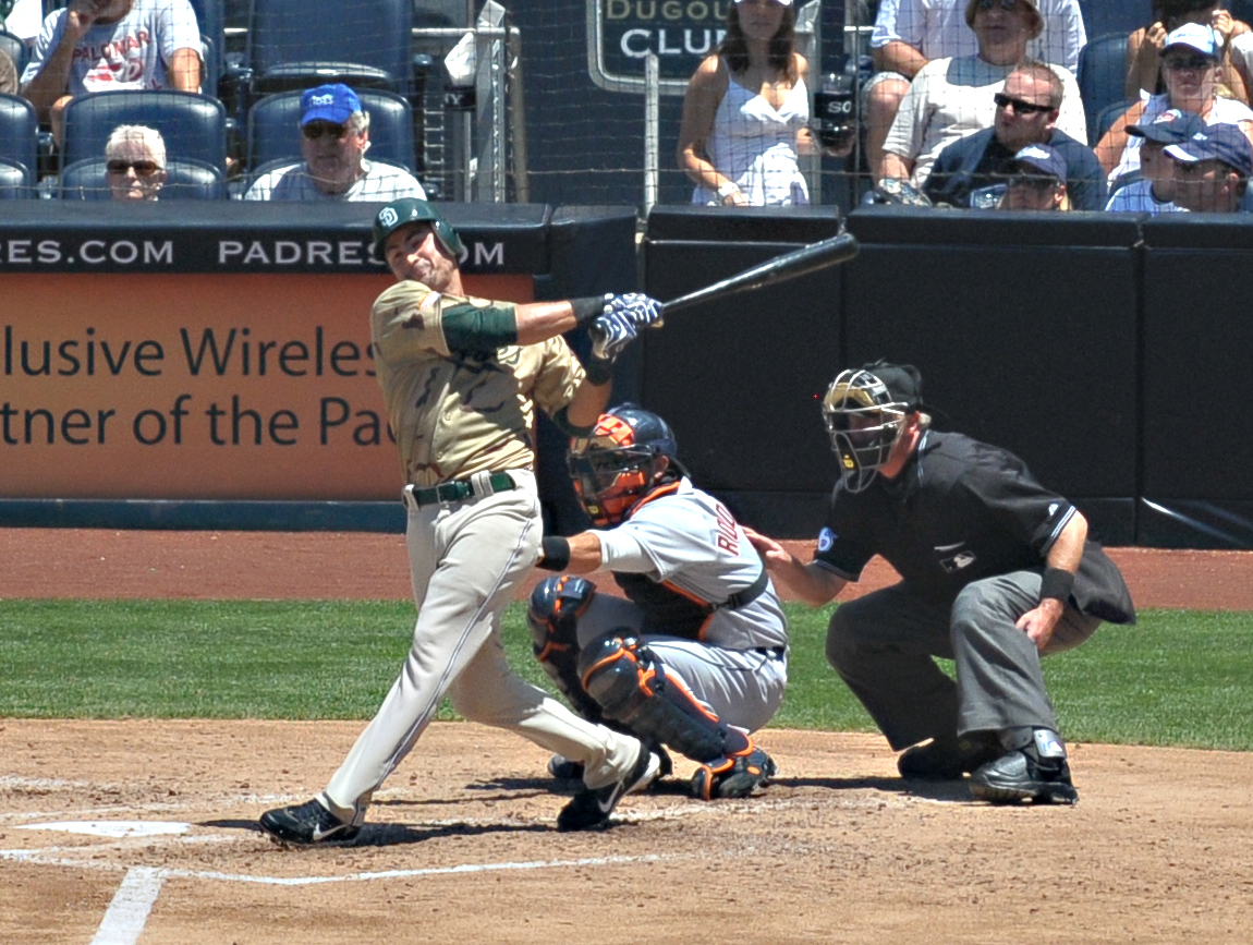 Edgar Gonzalez